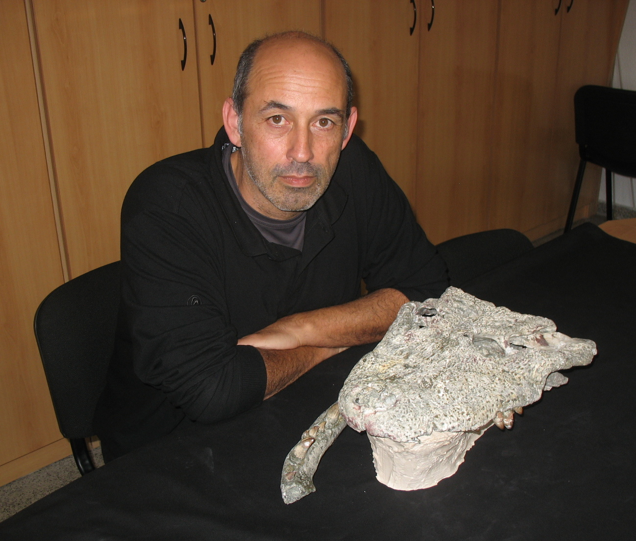 Francisco Ortega, paleontólogo español, con el holotipo de Lohuecosuchus megadontos.